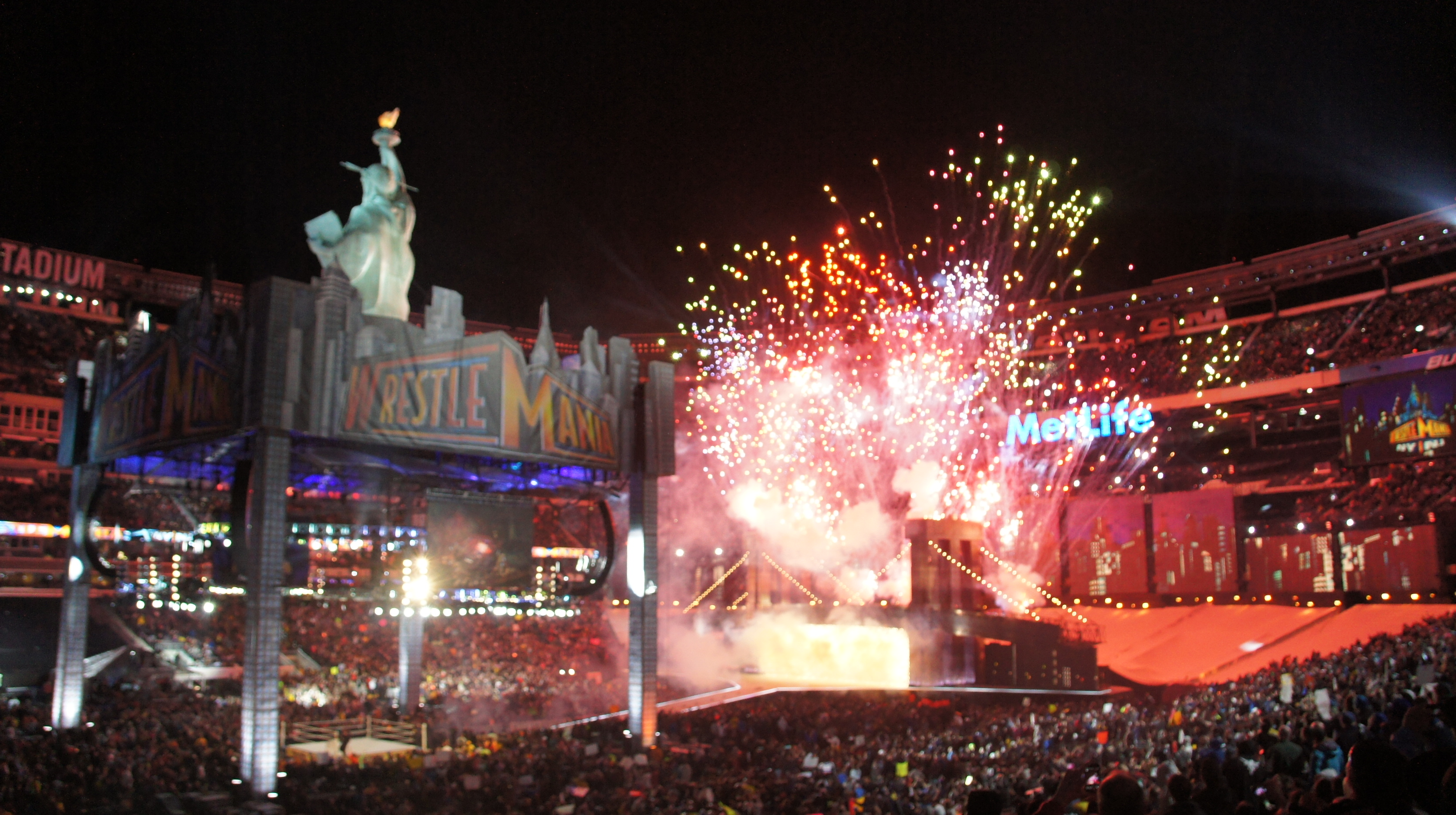 Pyro durant WrestleMania